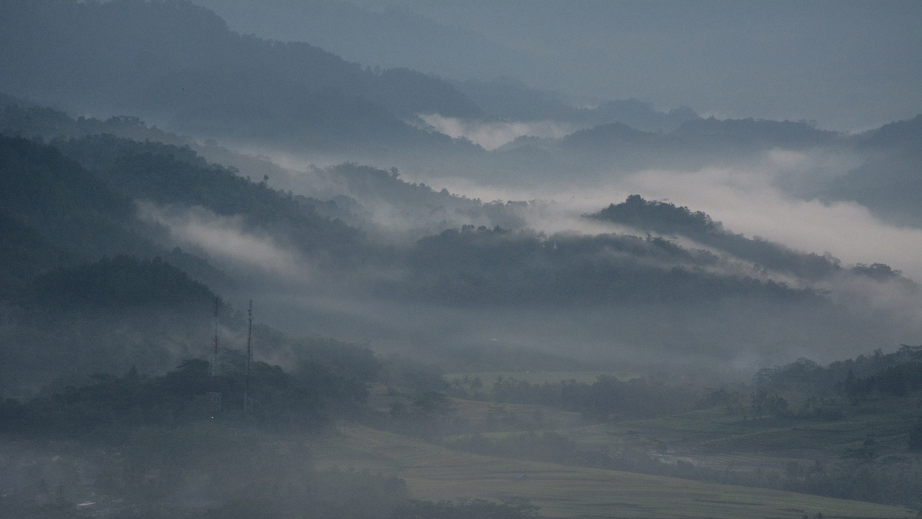 Secara geologis, Karangsambung berada pada kawasan Pegunungan Serayu Selatan. Seringkali disebut dengan istilah Kebumen High. Di Karangsambung terdapat Cagar Alam Geologi Nasional yang dikelola LIPI, karena peran pentingnya dalam percaturan ilmu geologi. Di sinilah proses-proses geologi dan geomorfologi memungkinkan manusia menemukan lapisan batuan yang berumur antara 125 - 65 juta tahun. Lapisan yang seharusnya ada di kedalaman bumi tersebut kondisi sekarang berada di permukaan bumi karena proses tumbukan lempeng tektonik. Setiap tahun, ratusan mahasiswa geologi dan ilmu kebumian lainnya mendatangi tempat ini untuk memahami proses-proses geologi yang terjadi jutaan tahun yang lalu.